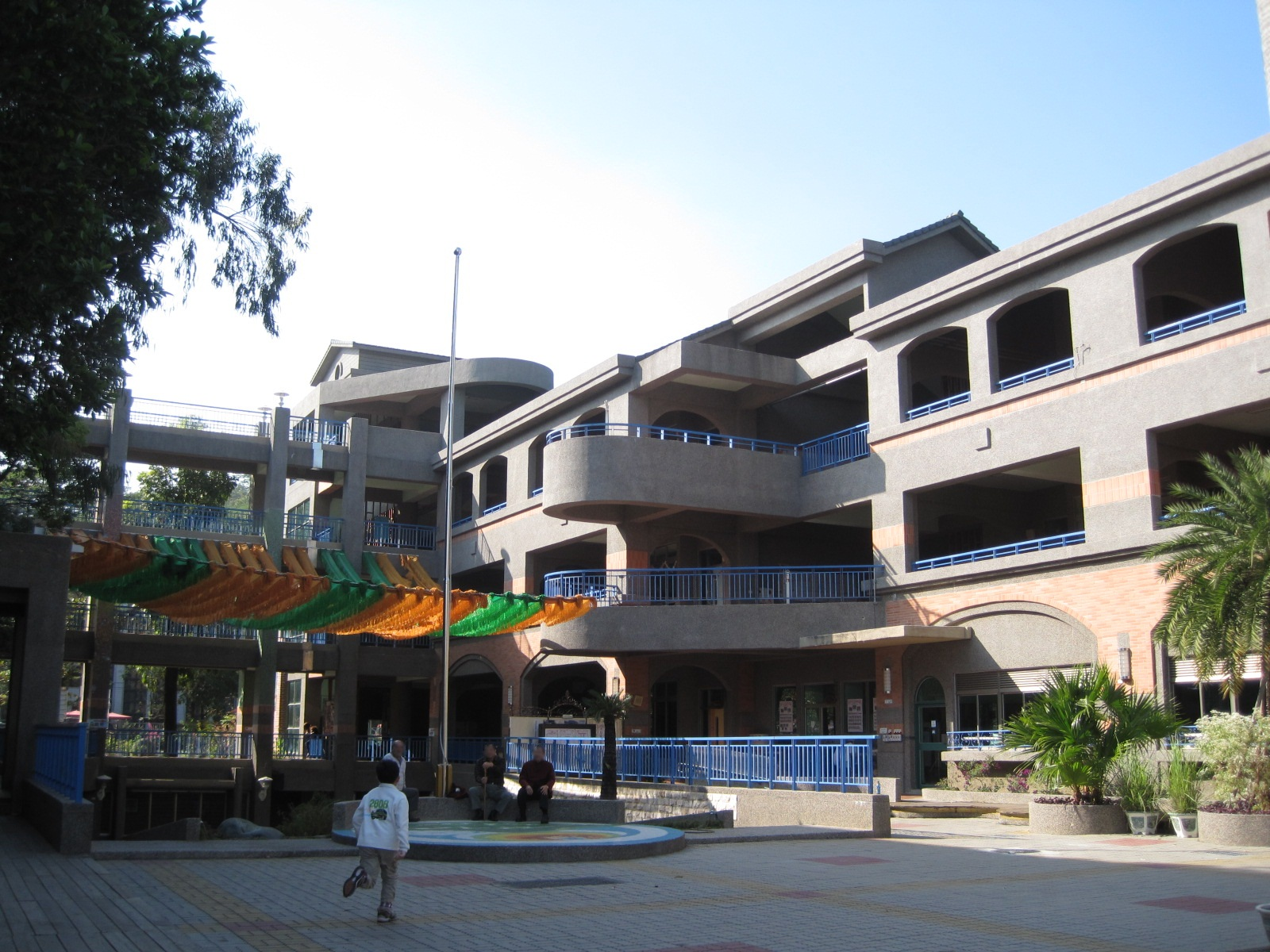 中文（台灣）: 高雄旗山國小一景